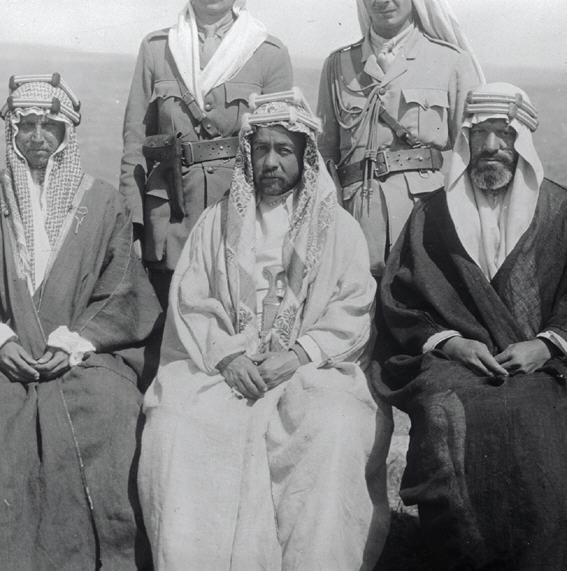 המלך עבדאללה ועוזריו